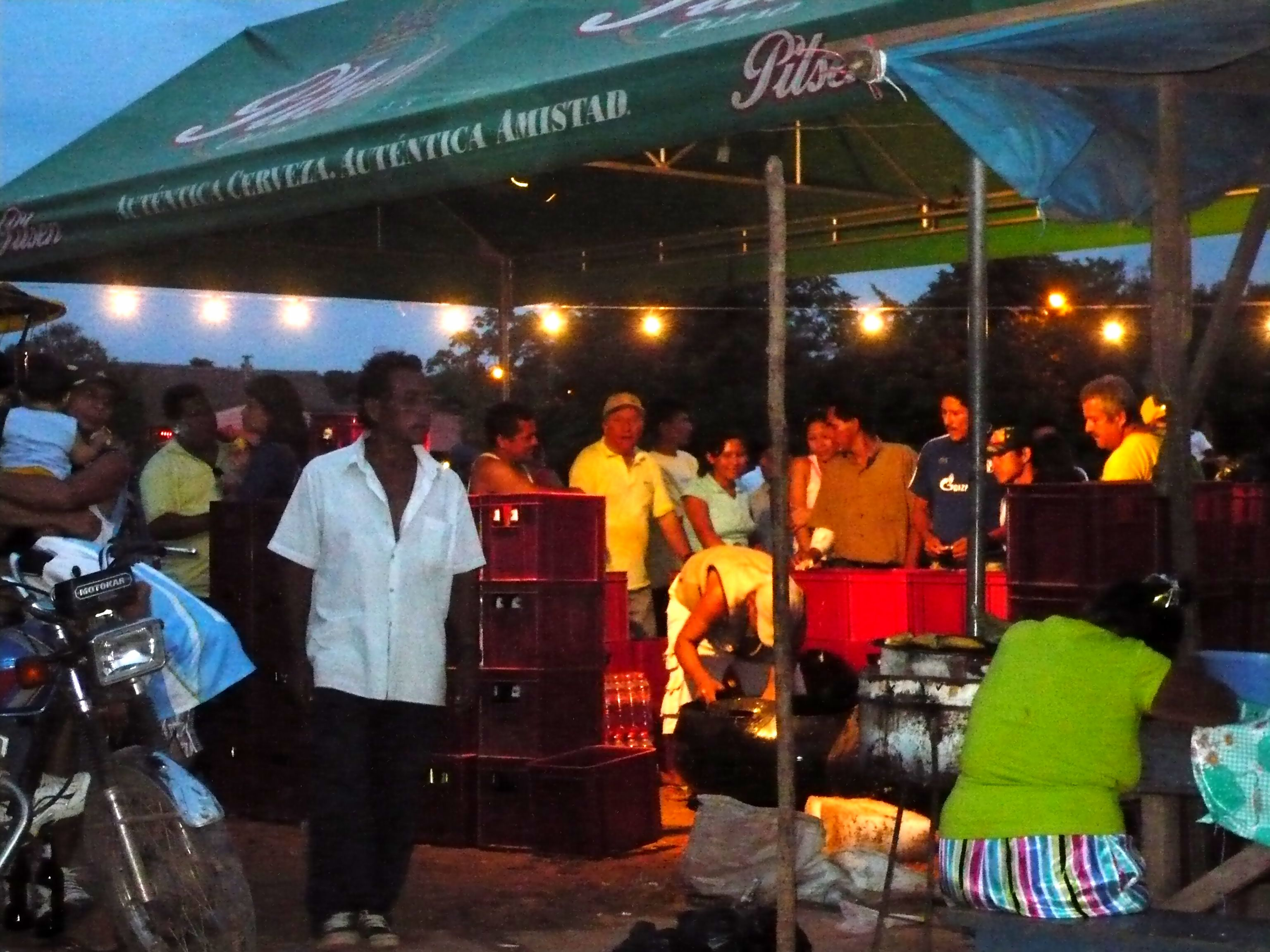 El comercio de Pucallpa como base de ventas es el gran consumo de cervezas donde él usa como medida de economía.